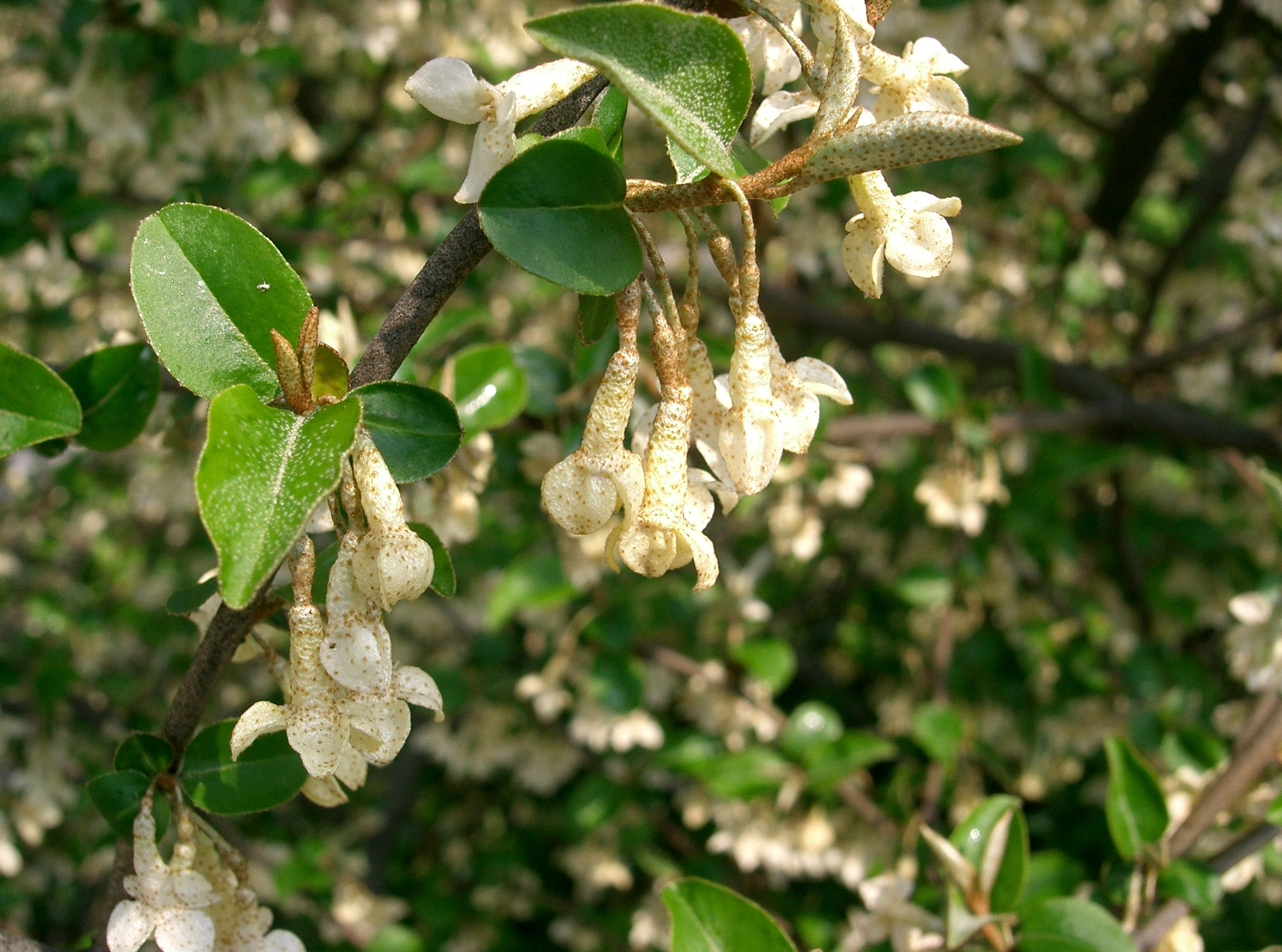 Scientific name Elaeagnus multiflora var. hortensis